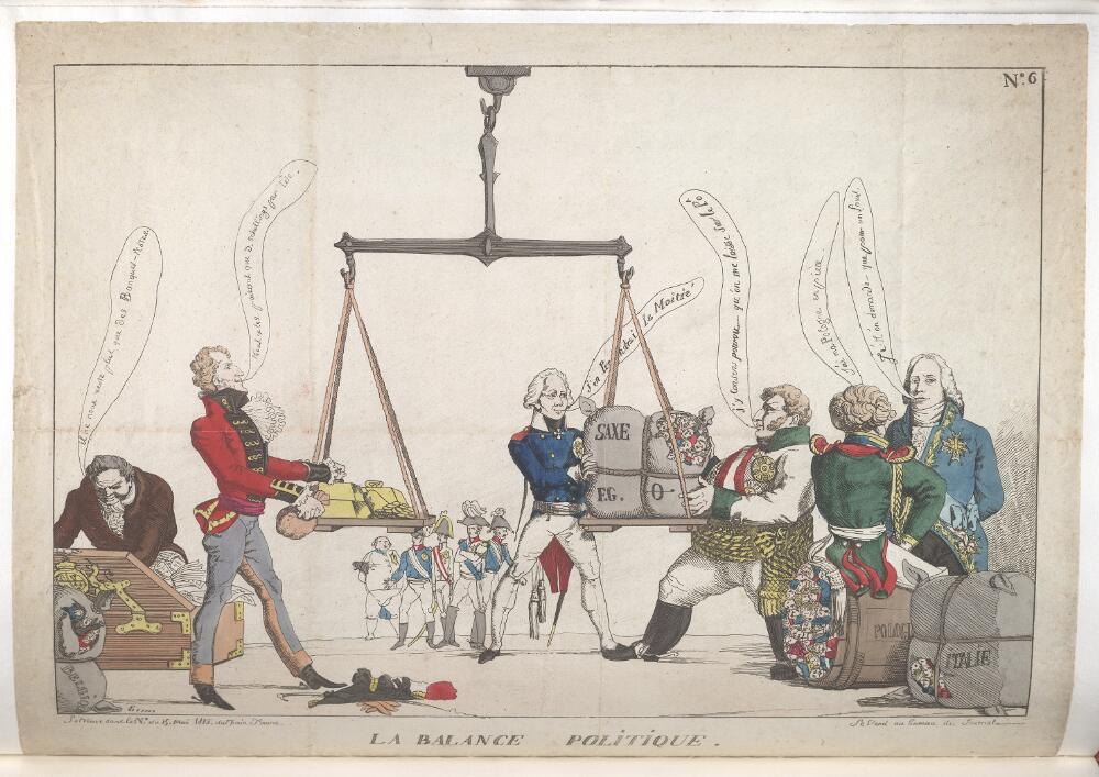 French political cartoon; "Se trouve dans le No. du 15 mai 1815 du Nain Jaune." (Le Nain jaune ou Journal des arts, des sciences et de la littérature, Paris, 1814-1815.) Numbered: No. 6. BMSat. speculates [?Eugene Delacroix del.]. References: De Vinck, No. 9512.